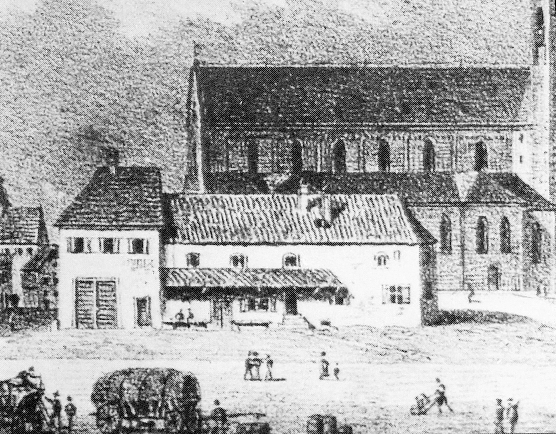 Erasmuskapelle in Kempten um 1850, jedoch spätestens 1857.